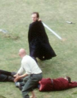 Sverdkamp fra steigen sagaspill 2003, bile tatt av pappa